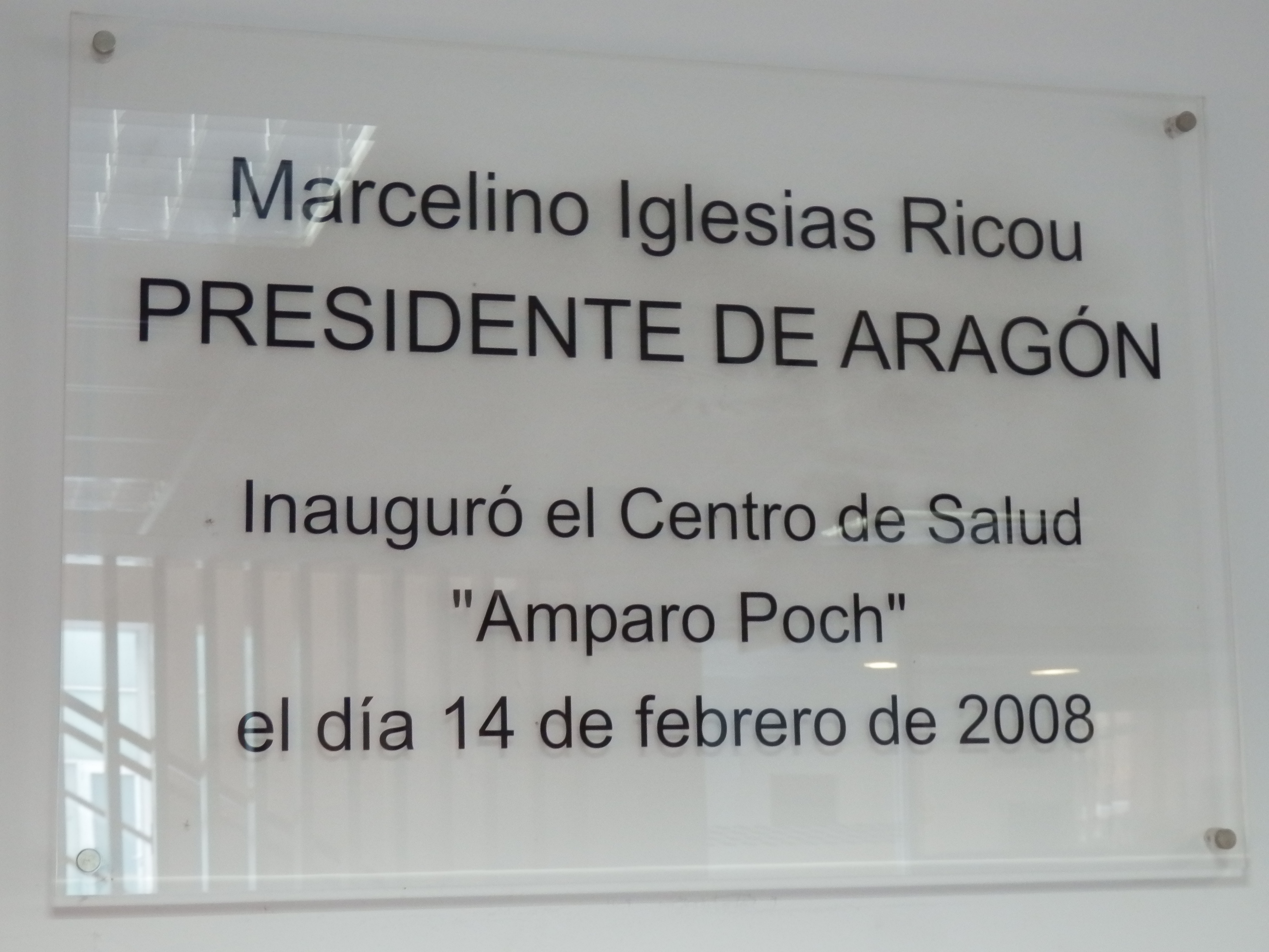 Centro de Salud Amparo Poch en la calle Emilia Pardo Bazán de Zaragoza. Placa de la inauguración del centro.